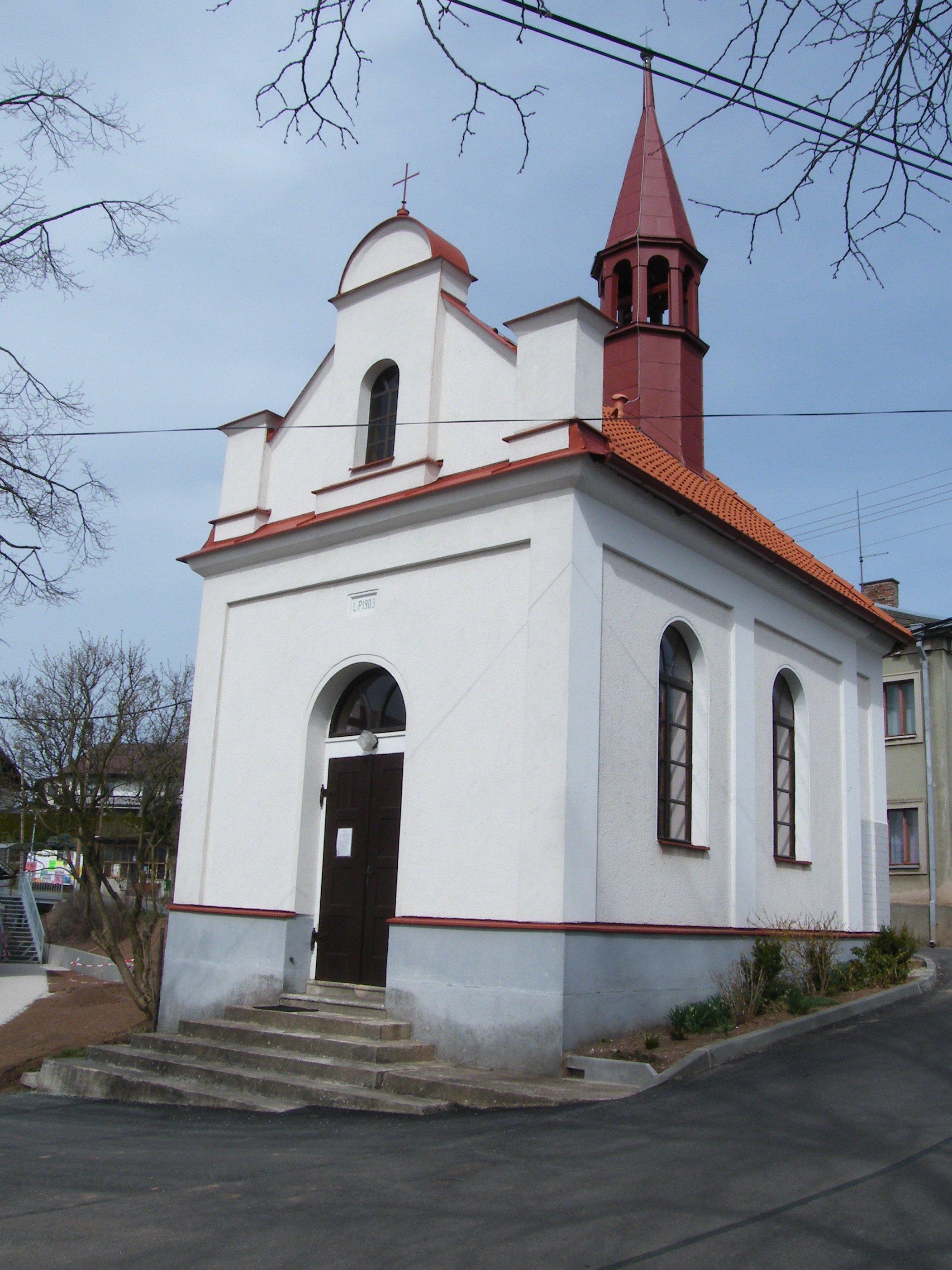 Kaple Navštívění Panny Marie v Lipí (Náchod)